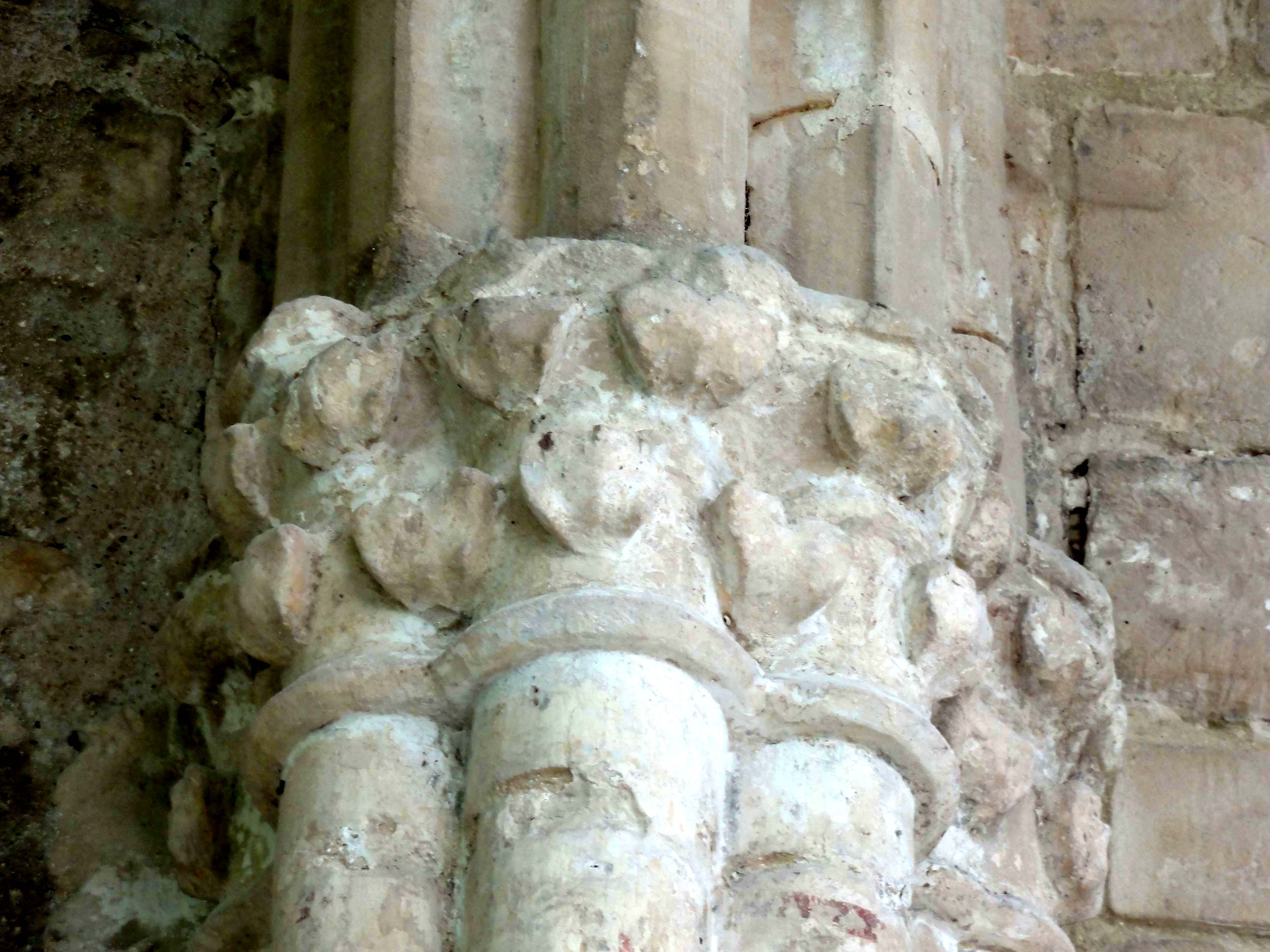 Chapiteau(x) de l'église - voir titre.